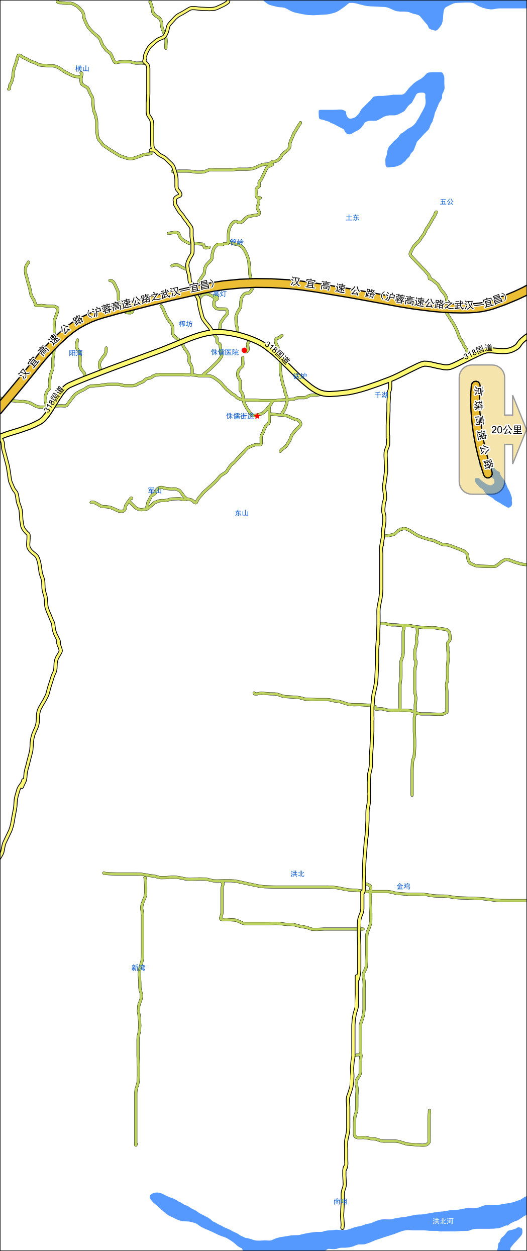 Town Map.